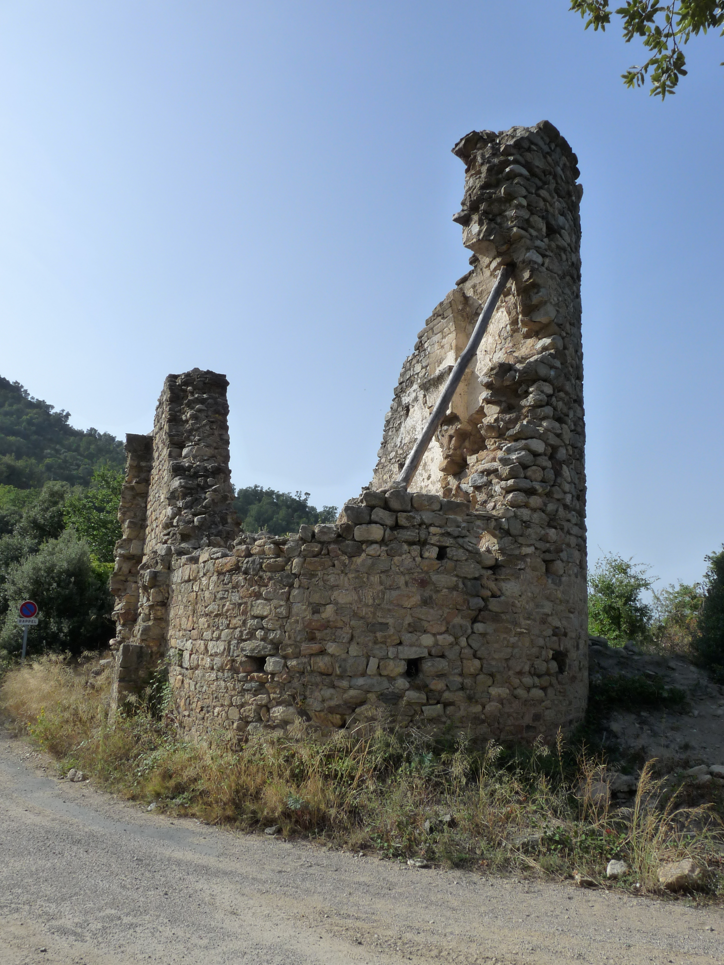 Vue des ruines de l'église Saint-Fructueux de Roca-Vella (commune de Laroque-des-Albères, Pyrénées-Orientales).